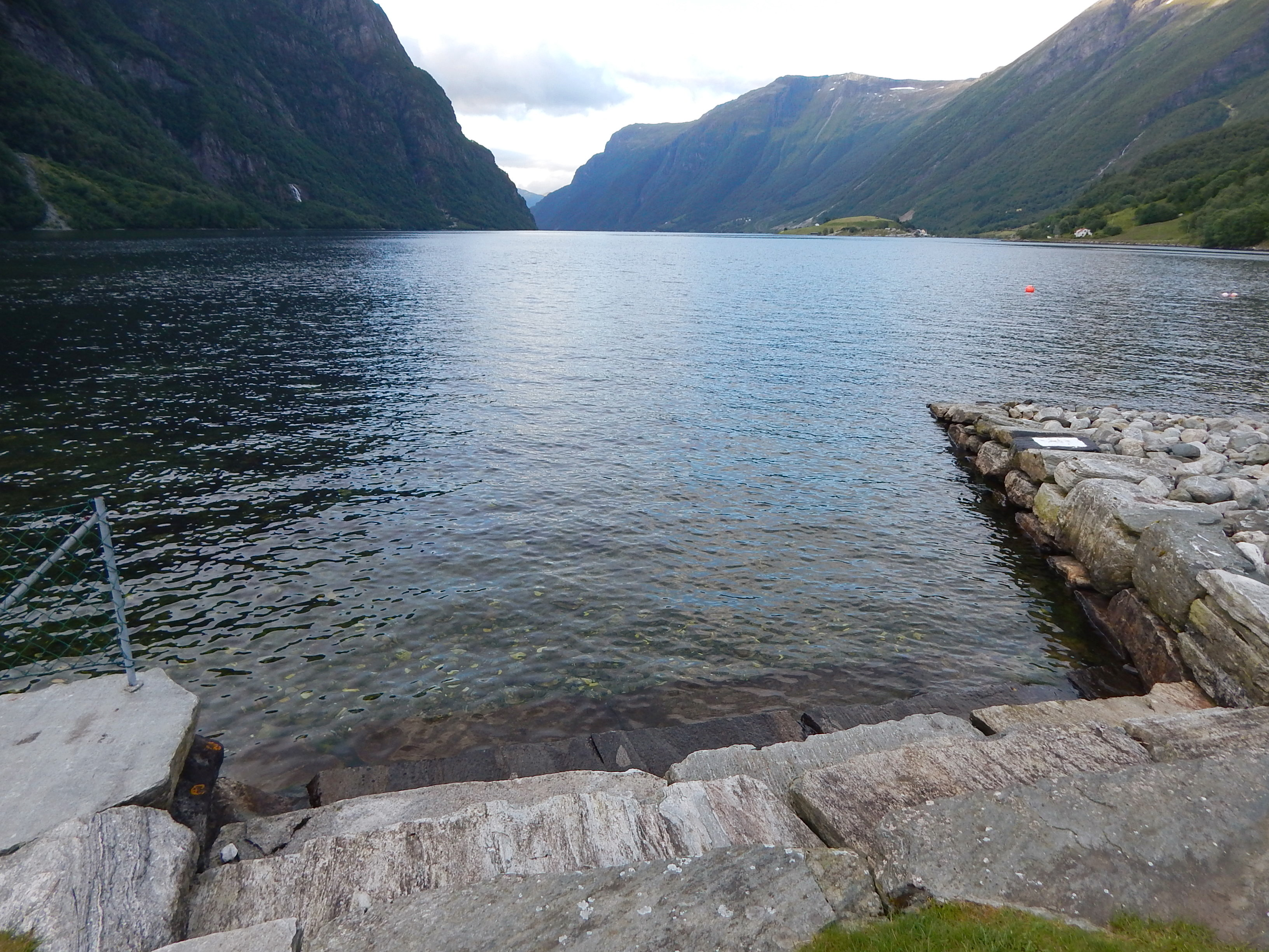 Hyefjorden sett fra Hyen (Straume)